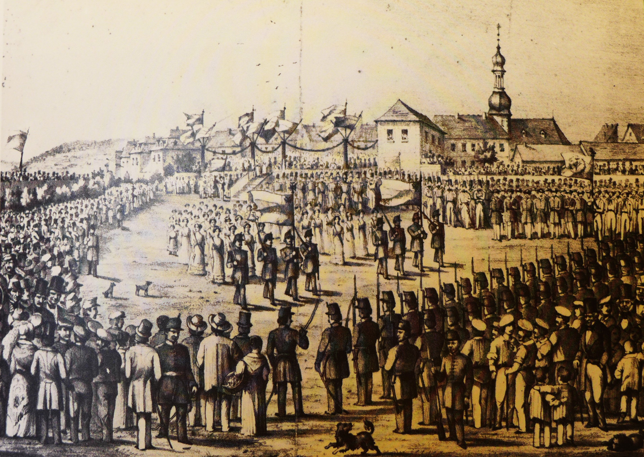 Fahnenweihe der Bürgerwehr am St. Johanner Saarufer im Jahr 1848 (Stadtarchiv Saarbrücken)